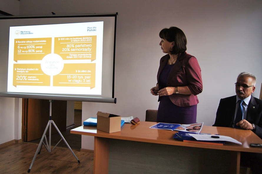 Spotkanie zorganizowane przez Bożennę Bukiewicz - Lubsko, Lubuskie (2012-11-25)